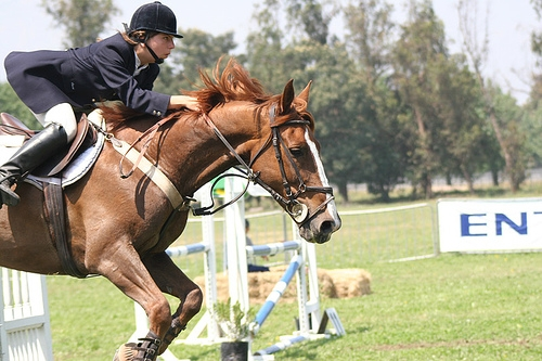 equitacion